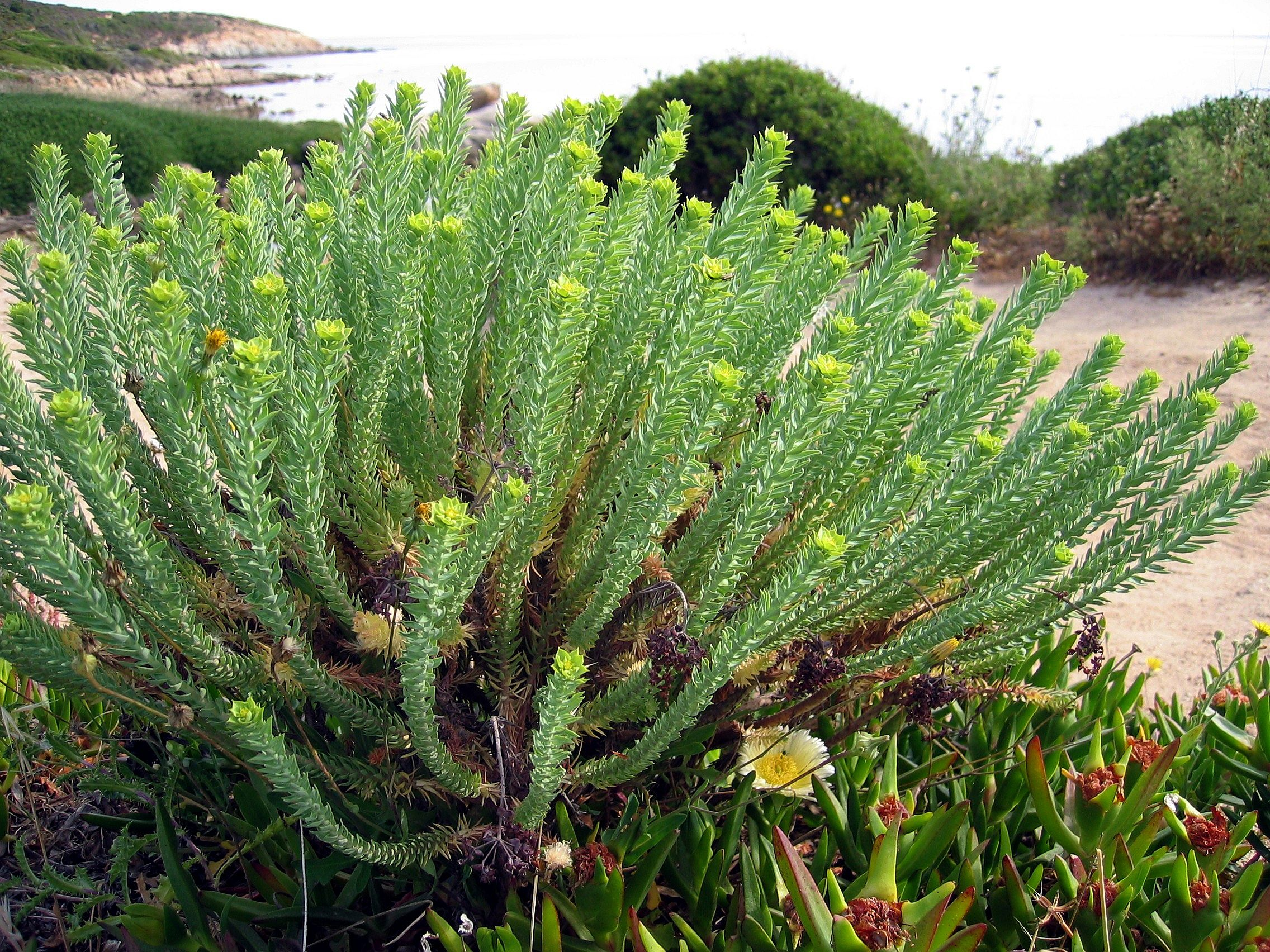 Euphorbia paralias, La Revellata, Calvi, Haute-Corse, France.